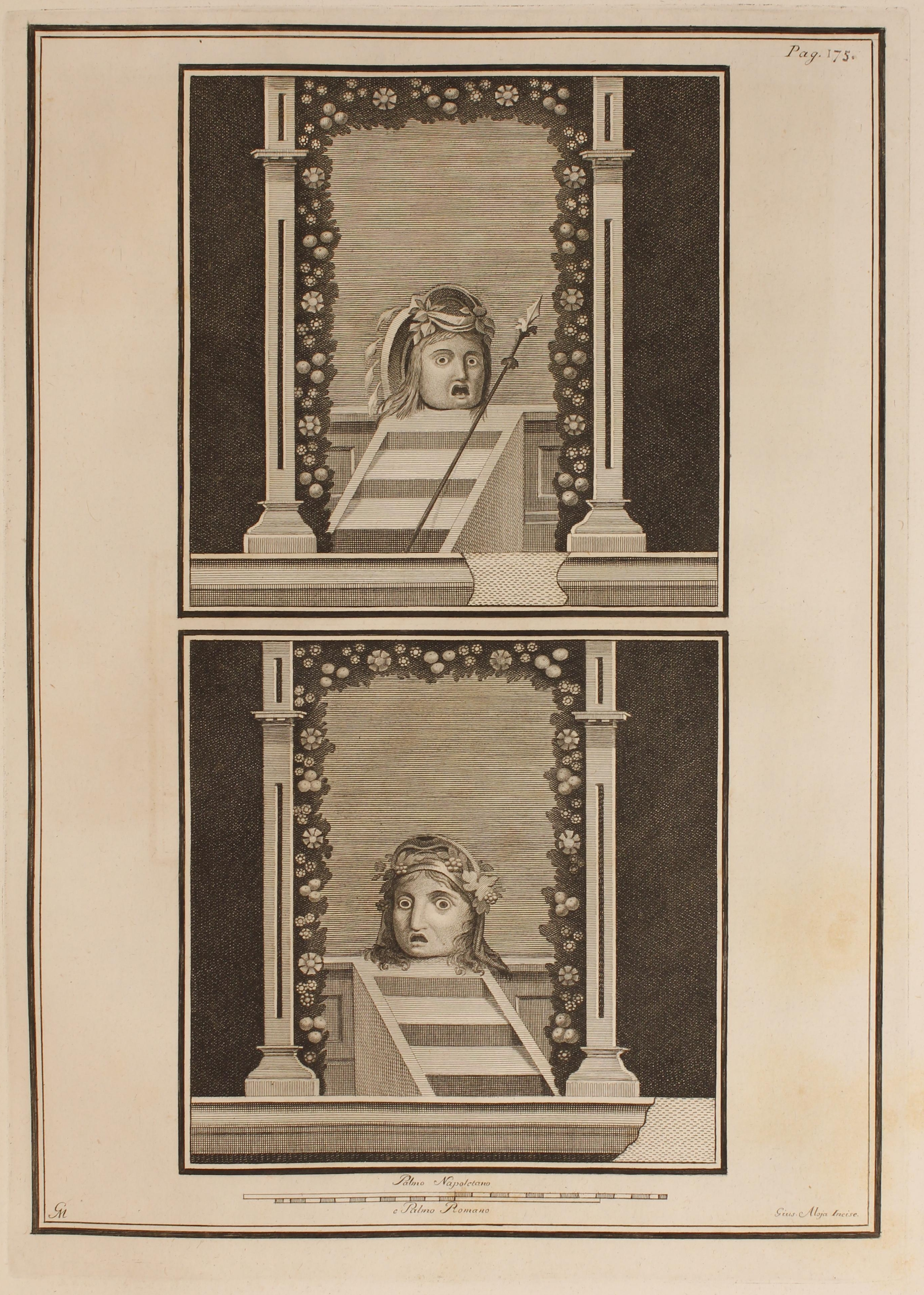 Descripción bibliográfica: Delle antichità di Ercolano. Tomo quarto. - Le pitture antiche d'Ercolano e contorni incise con qualque spiegazione. - Tomo quarto. - Napoli :|bnella Regia Stamperia, 1765. - [4], X, 368, [12] p., [1] h. de grab. : il. ; Fol (48x36 cm) Materia: Herculano (Ciudad antigua) - Antigüedades romanas Notas: Título en anteport.: "Le pitture antiche dÉrcolano. Tomo Cuarto" . - El editor es Pasquale Carcani, según el British Museum Catalogue. - Sign. : [a]-c2, d1, A-Z2, Aa-Zz2, Aaa-Ooo2. - Parte de las il. son h. de grab., numeradas I-LXX que van incluidas en la pag., pero no en las sign. . - La h. de grab. antep. calc. con retrato de Carlos III . - firmada: "Camillus Paderni ... delineavit, Philippus Morghen Florenti ... sculp" . - Las il. y h. de grab., son estampas calcograficas. - Texto con reclamos e iniciales grab. - Port. a dos tintas con grab. calc. : "G. Morg. d., F. Morg. s.", anverso y reverso medalla de Carlos III. Ilustradores: Morghen, Giovanni Elia, 1721-después de 1789, il. Morghen, Filippo, 1730-ca.1807, il. Nolli, Carlo, il. Grado, Filippo de, il. Aloja, Giuseppe,17..-1788?, il. Vanni, Nicola, il. Cepparoli, Francesco, il. Pozzi, Rocco, (m. ca. 1780), il. Campana, Ferdinando, il. Fiorillo, Niccola, il. Orazi, Carlo, il. Strina, Ferdinando, (fl. 1730-1760), il. Vanvitelli, Luigi,, il. Billy, Nicolaus, il. Sesone, Francesco, il. La Vega, Francesco, il. Azzerboni, Giuseppe, il. Gaultier, Pierre, il. Paderni, Camillo, il. Frezza, Giovanni Girolamo Orazi, Nicola, il. Casanova, Giovanni, il. Impresor: Accademia ercolanese di archeologia. Impresor: Stamperia Reale (Nápoles) Lugar de impresión: Italia. Nápoles Localización: Vea la ilustración en su contexto Libro completo en pdf